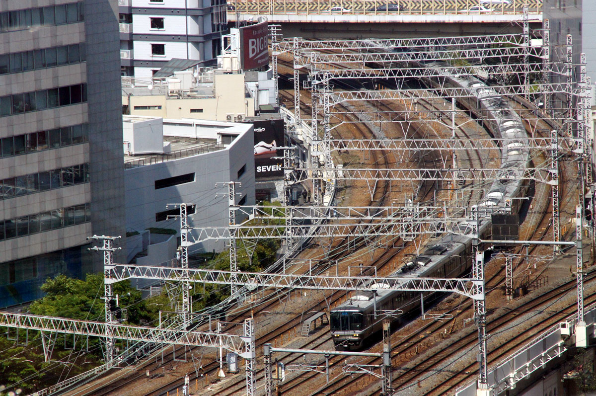 JR西日本223系（JR京都線）